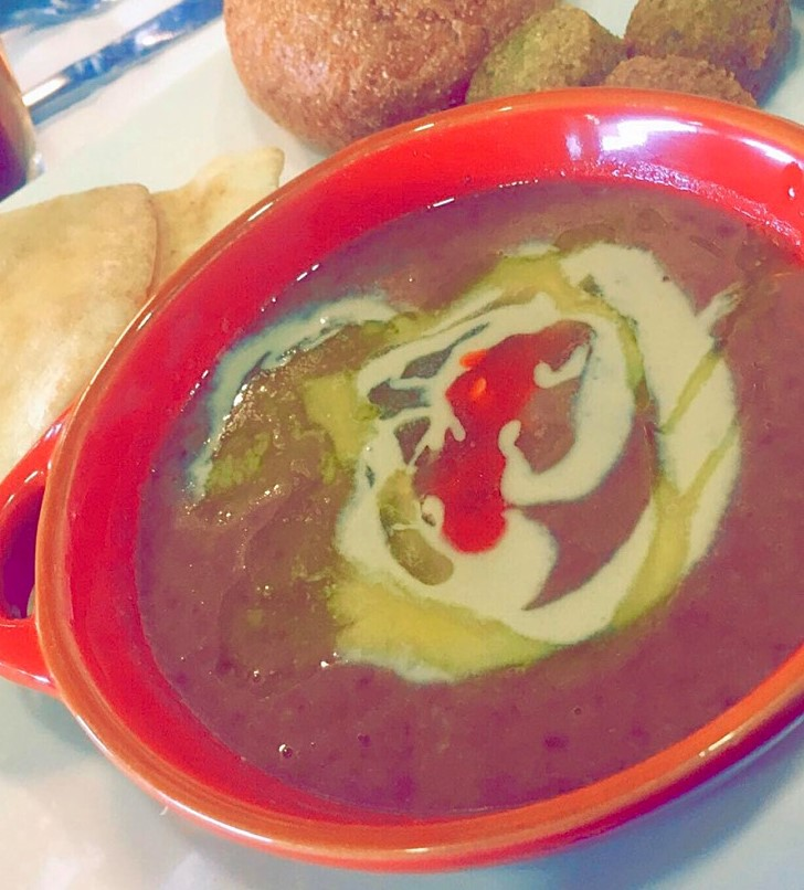 صحن فول مع طحينية